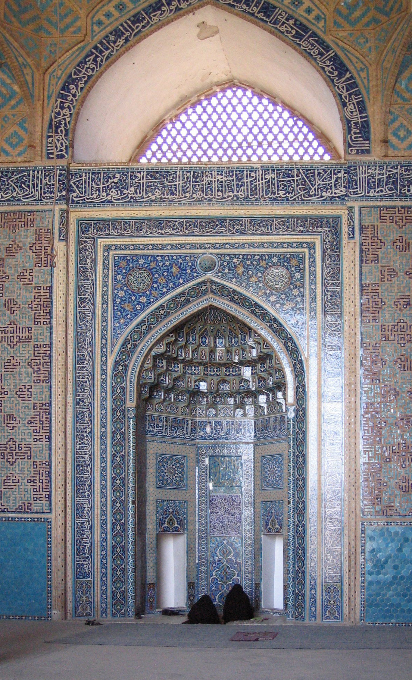 Mehrab Masjed-e Jomeh Yazd, Iran.